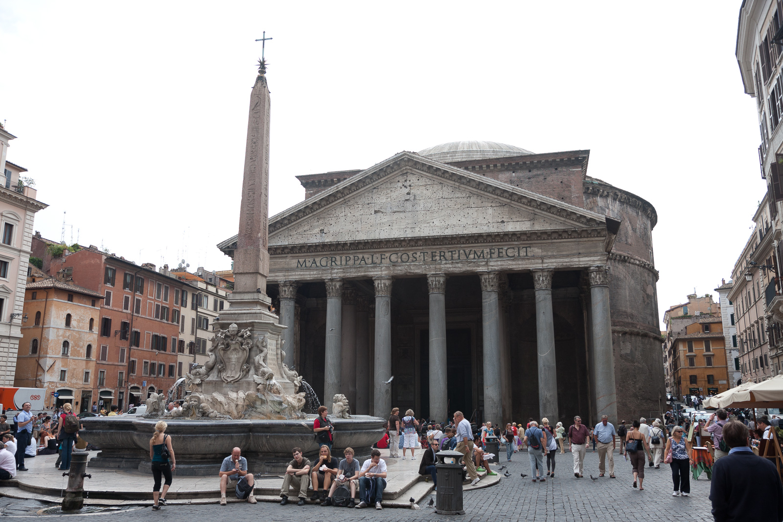 Obelisco del Pantheon